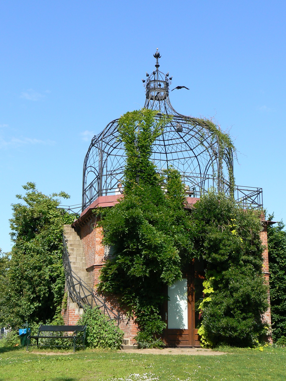 Alter Botanischer Garten Kiel: Achteckiger Pavillon auf der höchsten Stelle des Gartens. In der schmiedeeisernen Krone sind die für Botanische Gärten typischen Lotosblütenornamente zu sehen. Erbaut: 1891.